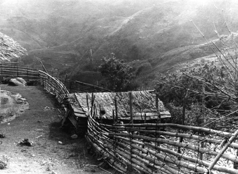 Gangtok-Chudup, Schuppen vor dem Haus des Ortsvorstehers von Chudup